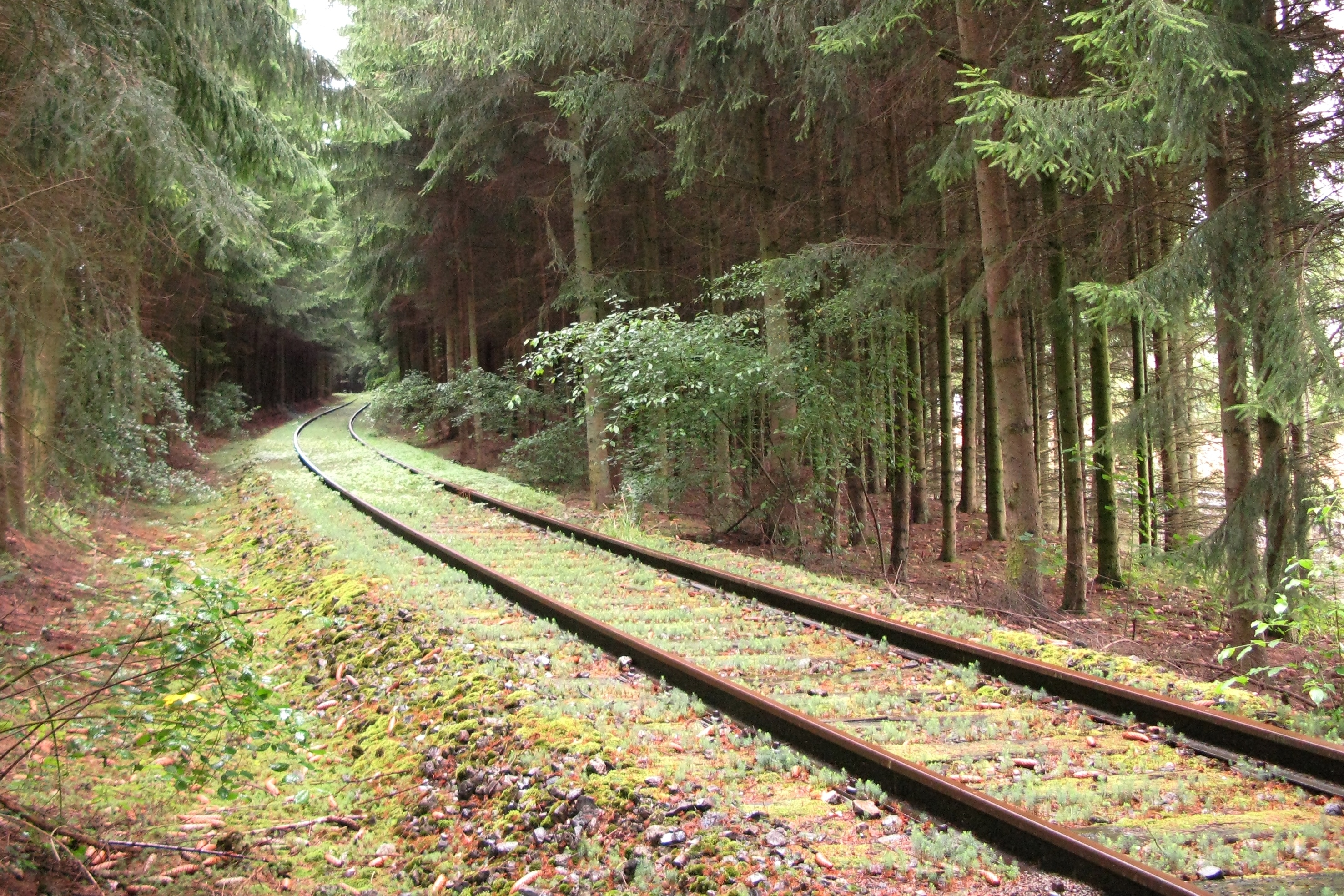 D'Attertlinn zu Bissen am Juni 2008